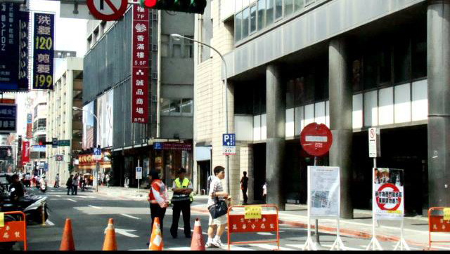 2008年臺北市都市更新處「西門徒步區擴大試辦計畫」的亂象。